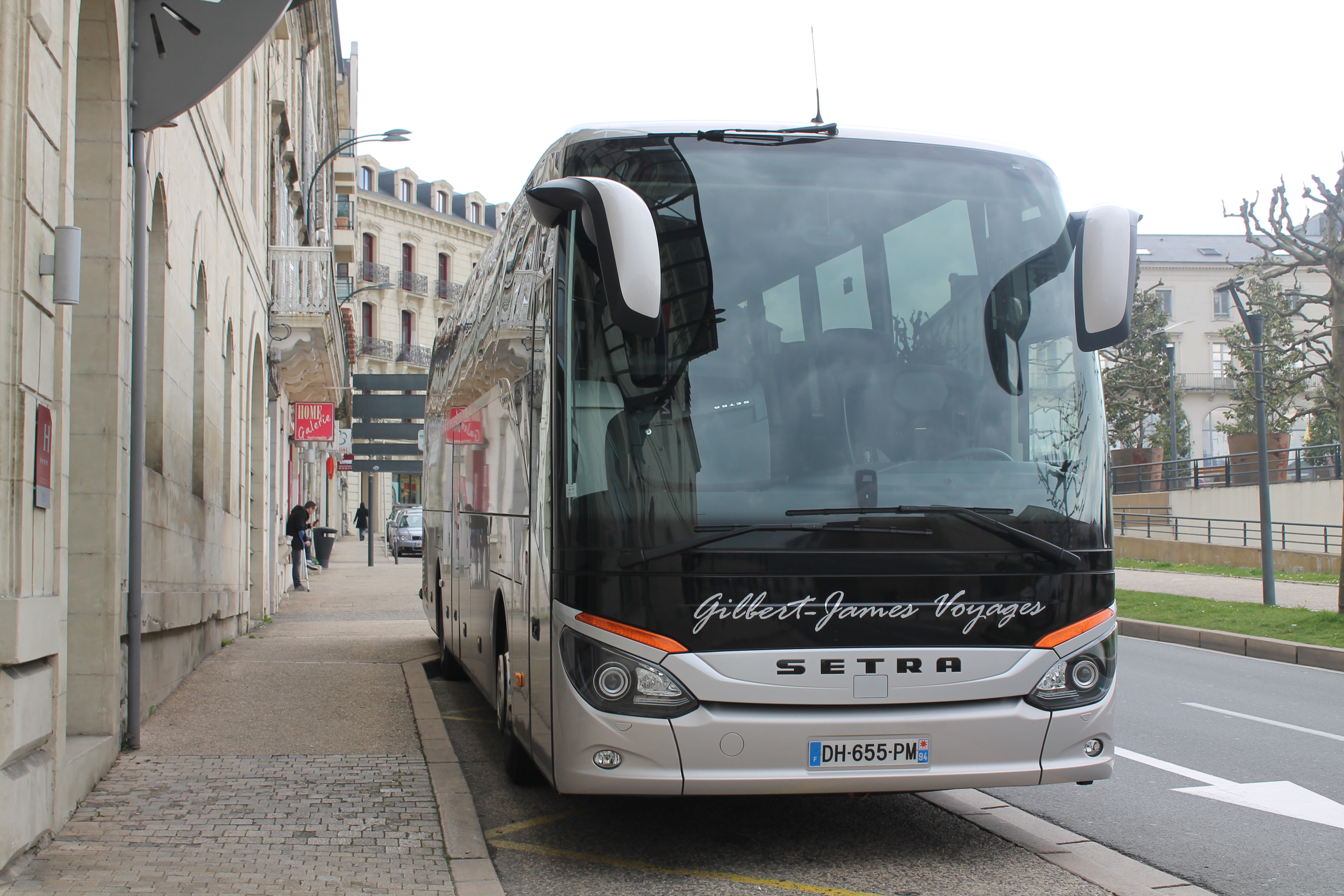 Autocar